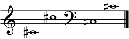 Nuty cis na pięciolinii.